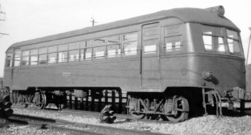 ク2220形付随車